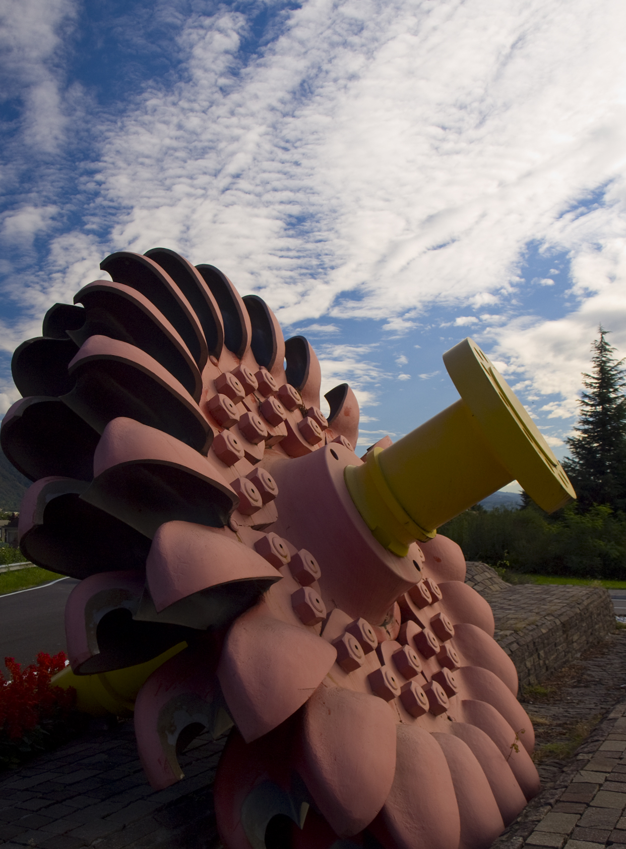 La Turbina - monumento alle vittime degli infortuni sul lavoro This is a photo of a monument which is part of cultural heritage of Italy.